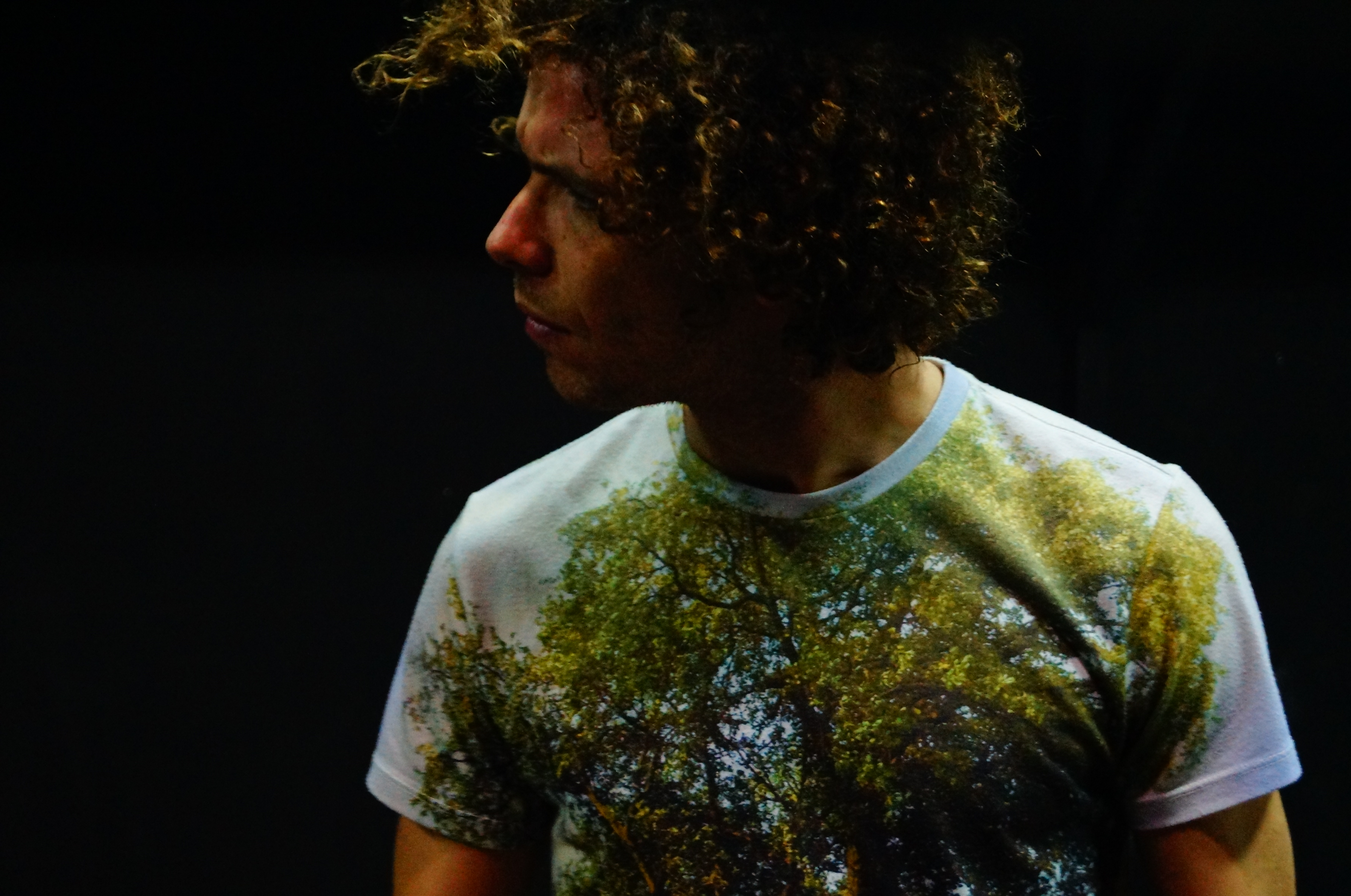 Yavor Baharov, Rehearsal for The Dark Room Явор Бахаров, репетиция на сцена